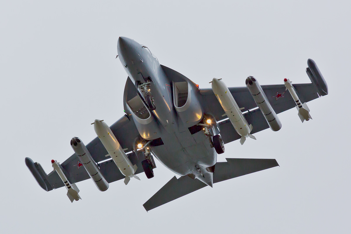 Taken during validation